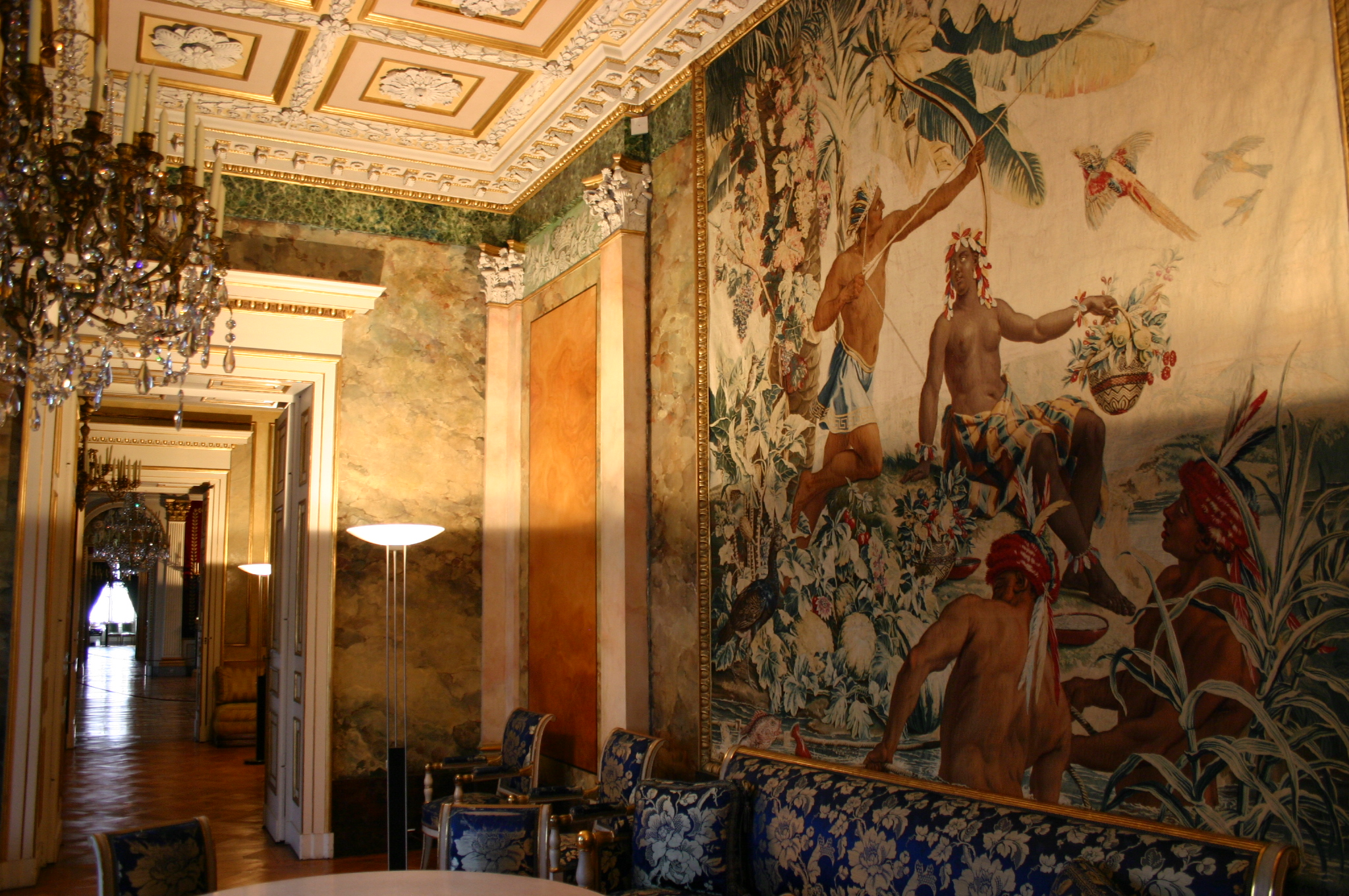 Audienzzimmer Ehrenburg, Tapisserie nach Albert Eckhout